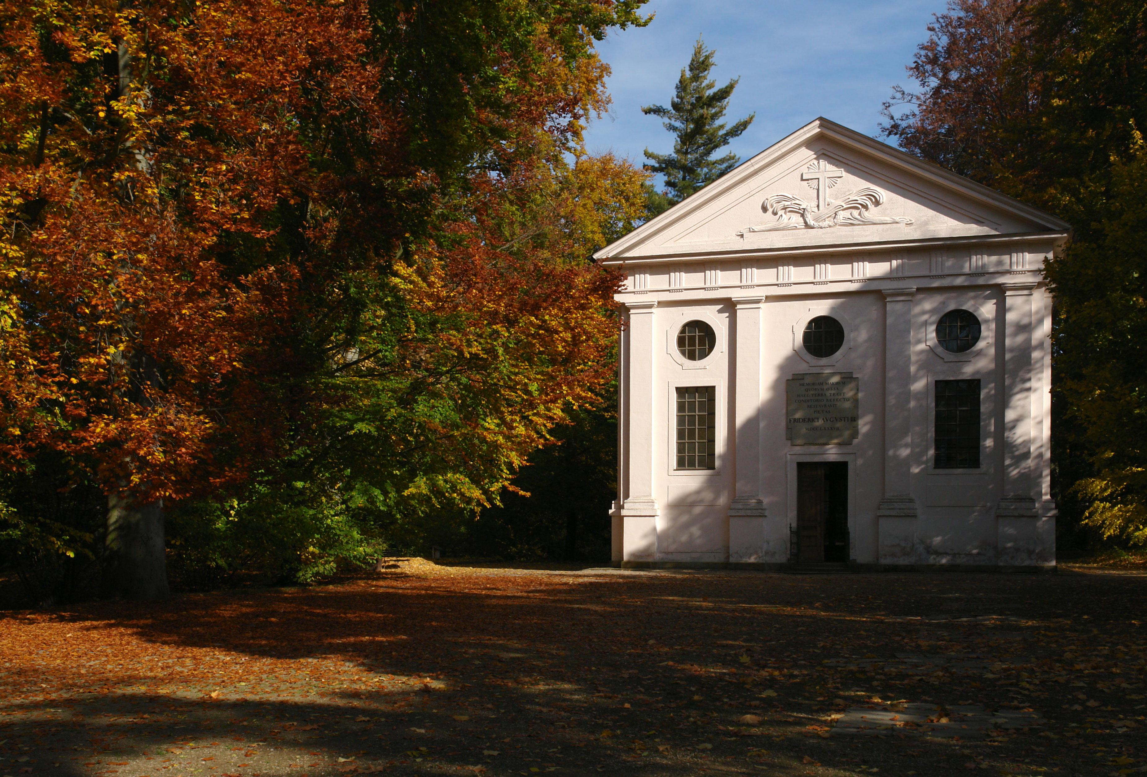 Mausoleum vom Kloster Altzella